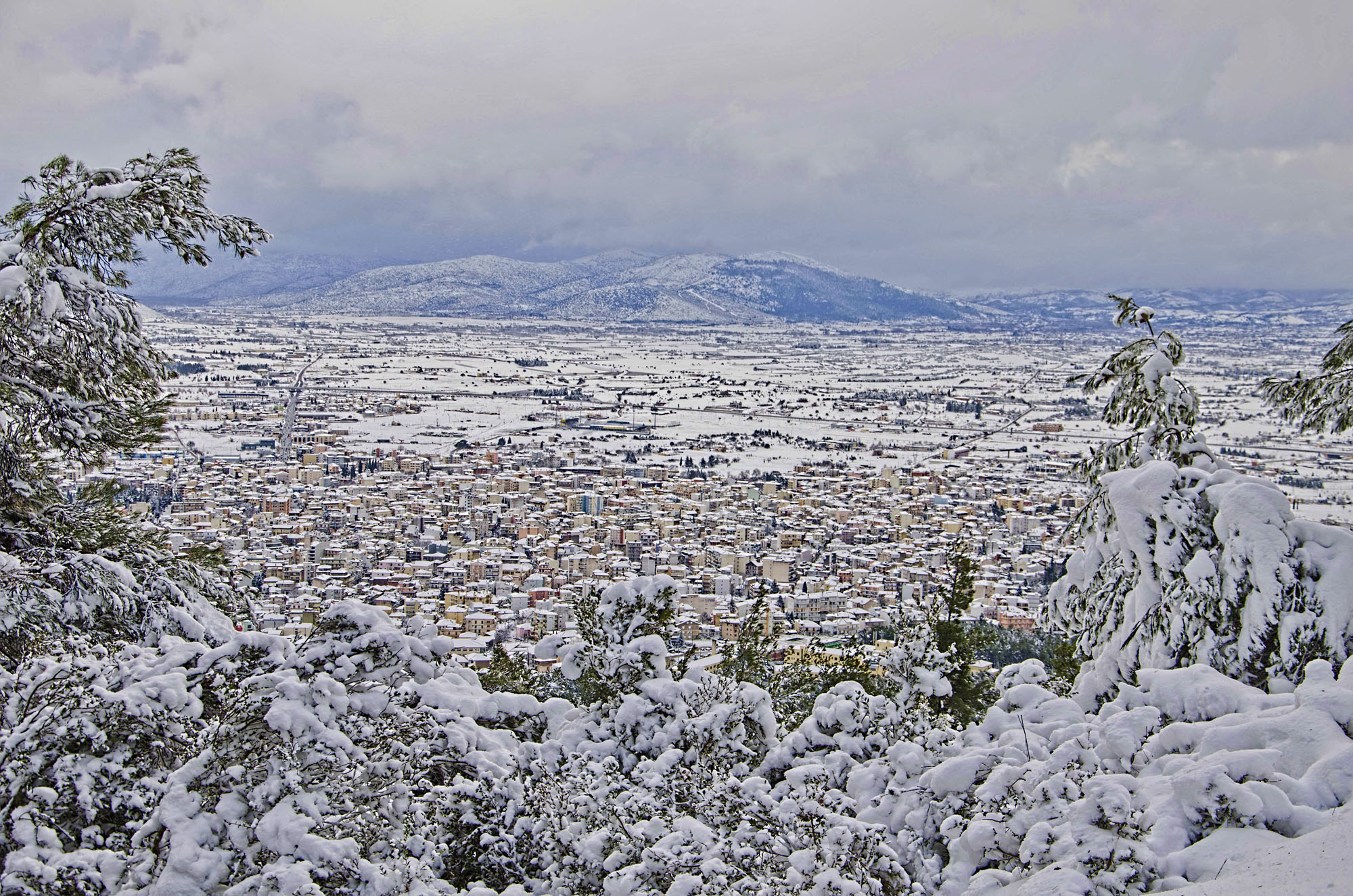 Η λήψη έγινε απ'το κάθισμα του Κολοκοτρώνη This is a photography of Natura 2000 protected area with ID GR2520001